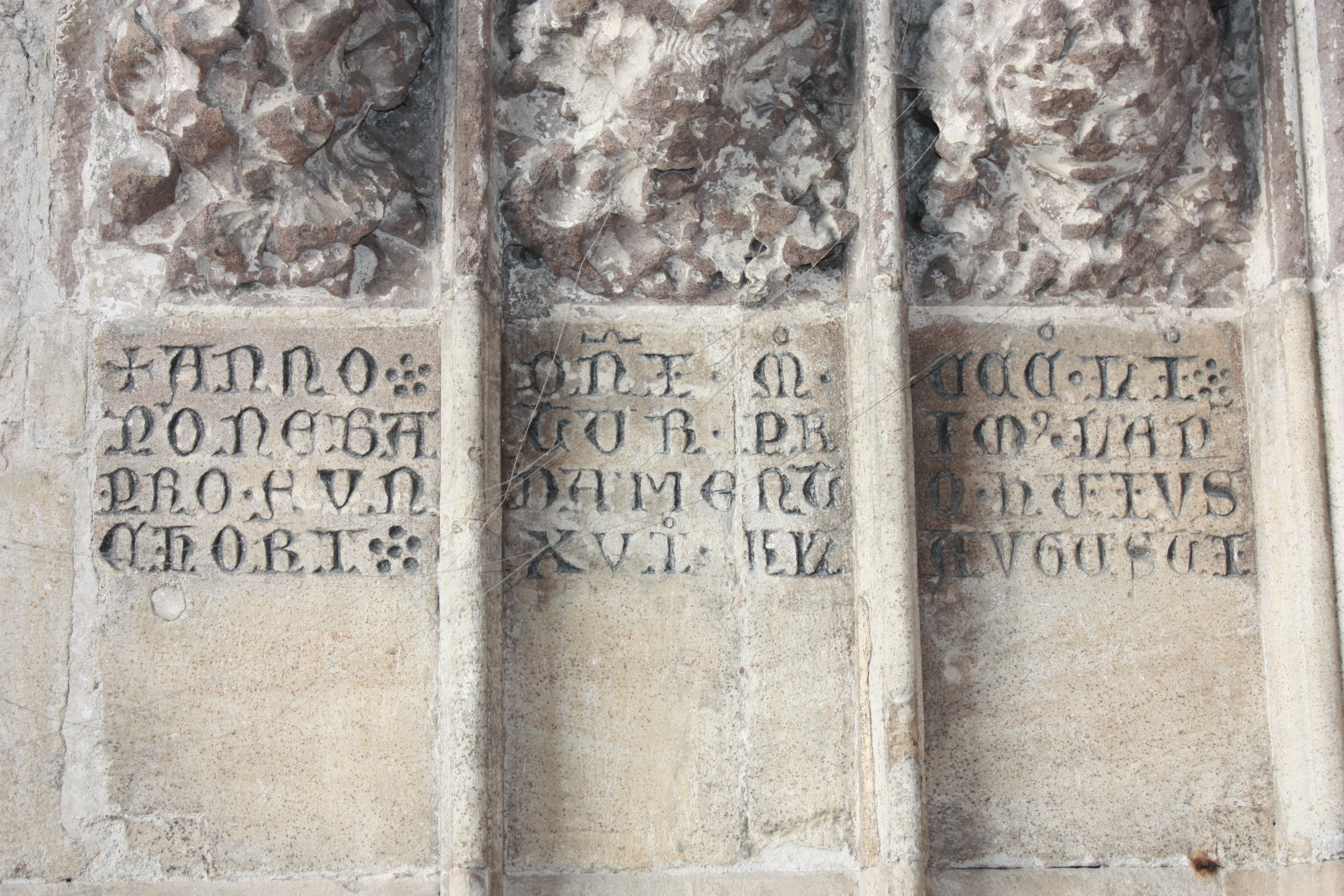 Grundstein des Chores des Hl.-Kreuz-Münsters in Schwäbisch Gmünd. Er befindet sich am Chornordportal.